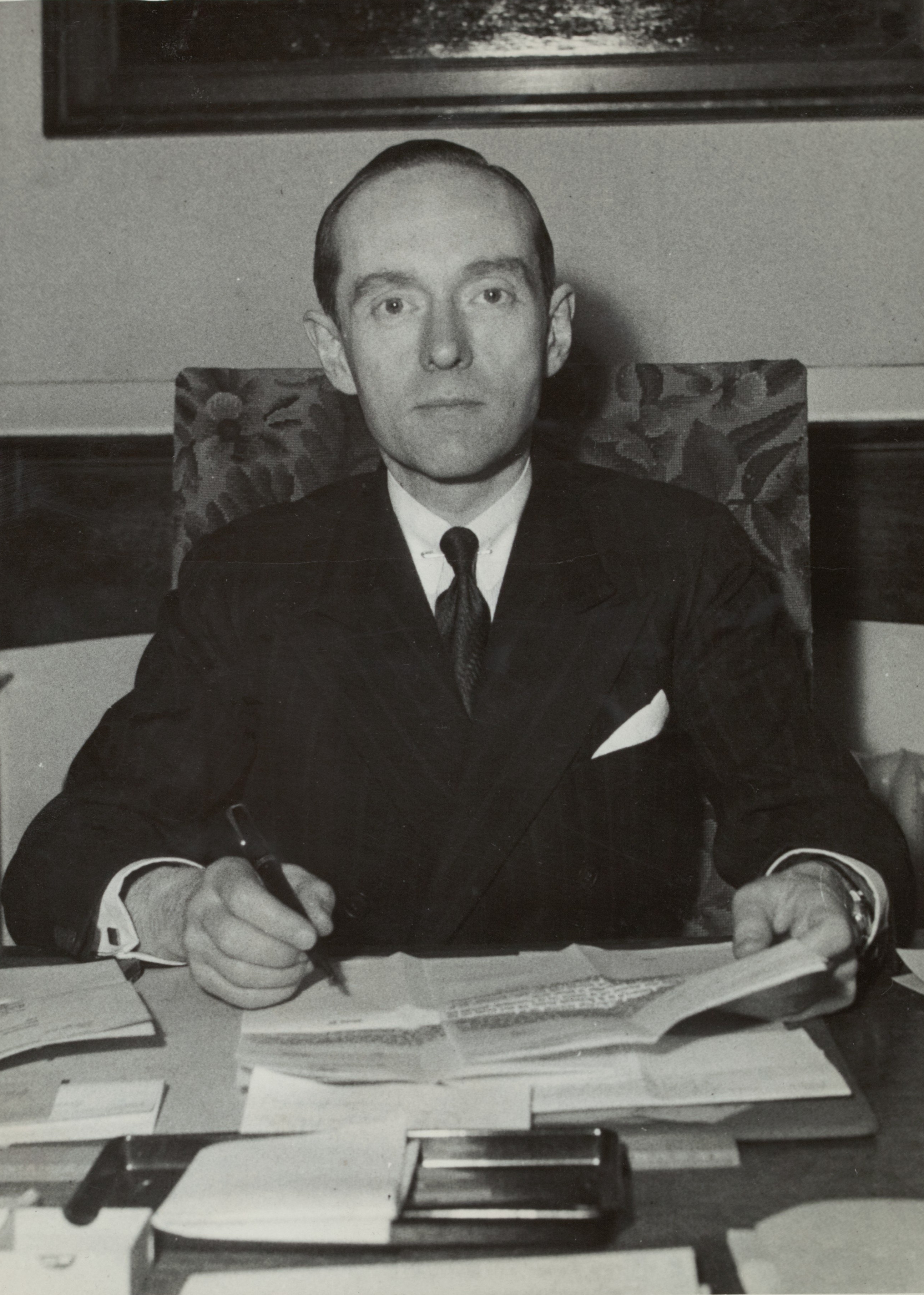 Collectie / Archief : Fotocollectie Rijksvoorlichtingsdienst Eigen Reportage / Serie : [ onbekend ] Beschrijving : ministers, Roijen, Herman van Datum : ongedateerd Trefwoorden : ministers Persoonsnaam : Roijen, Herman van Fotograaf : Fotograaf Onbekend / Anefo Auteursrechthebbende : Nationaal Archief Materiaalsoort : Foto (zwart/wit) Nummer archiefinventaris : bekijk toegang 2.24.10.02 Bestanddeelnummer : 139-0742